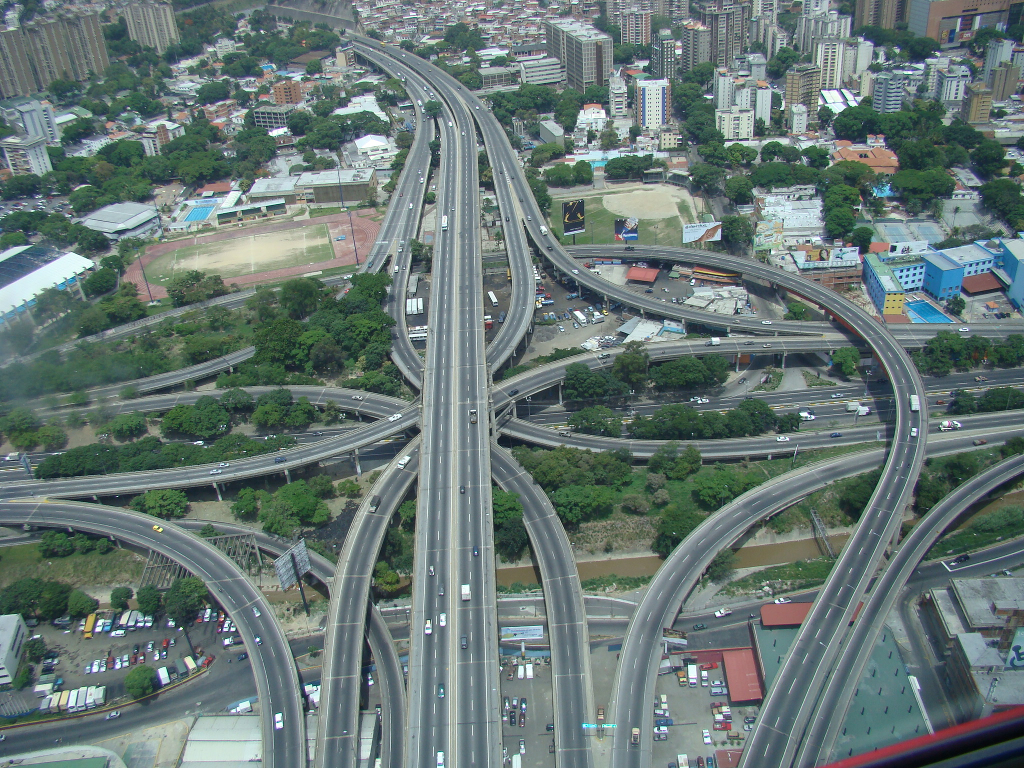 Stack interchange in Caracas